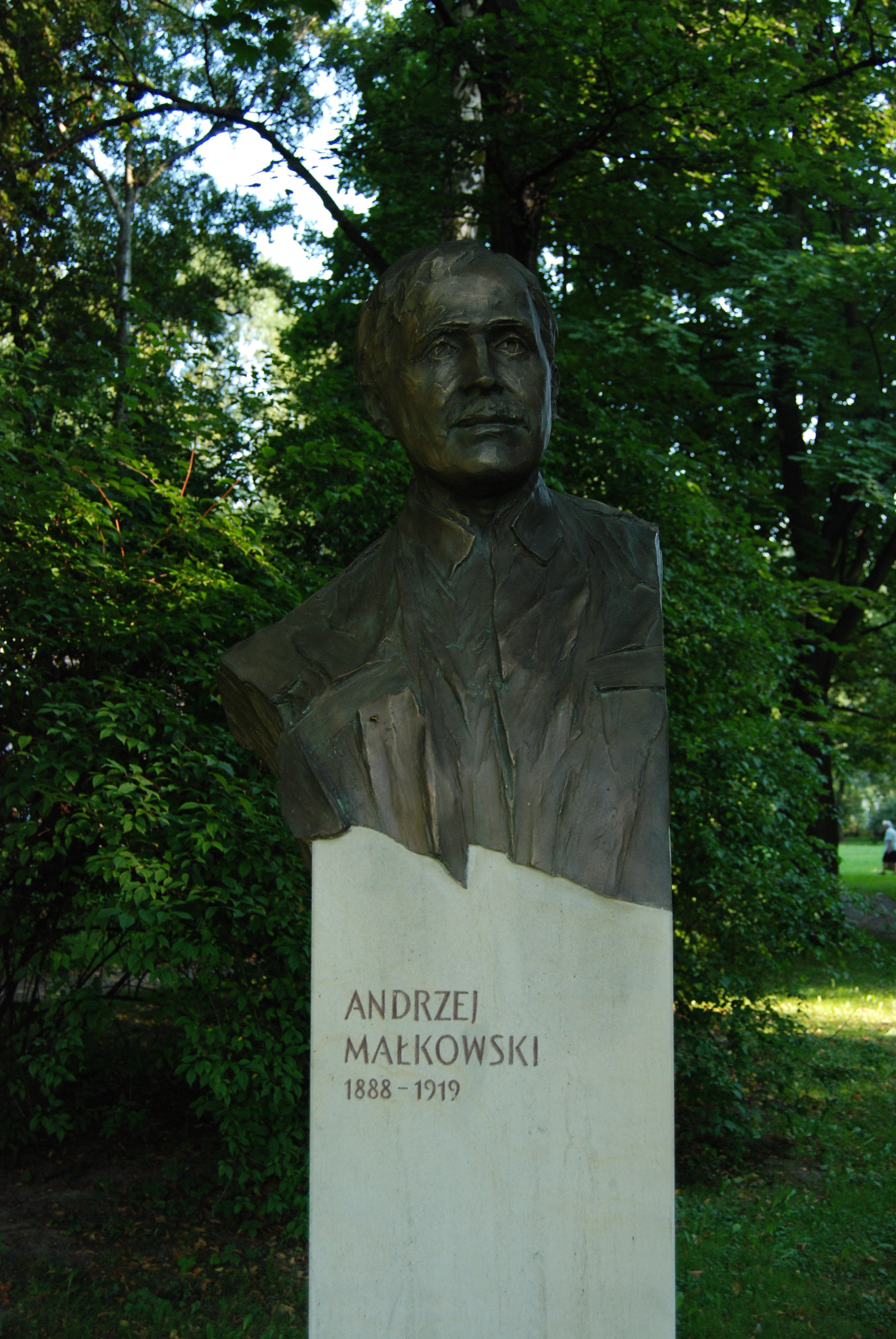 Pomnik Andrzeja Małkowskiego w Parku Jordana w Krakowie. Odsłonięty 27 sierpnia 2011.